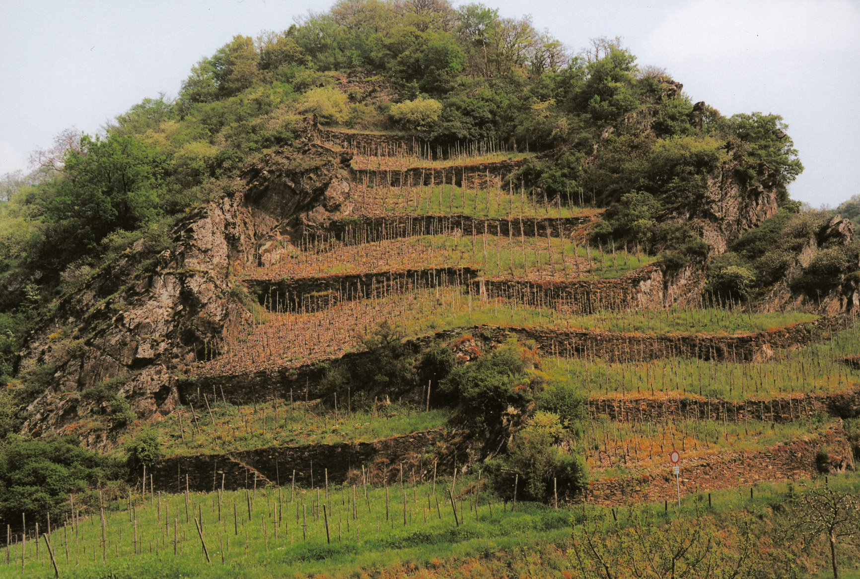 Alte Steillage, aus den Felsen geschlagen und terrassiert. Niederfell, Einzellage Grub in den Niederfeller Fächern